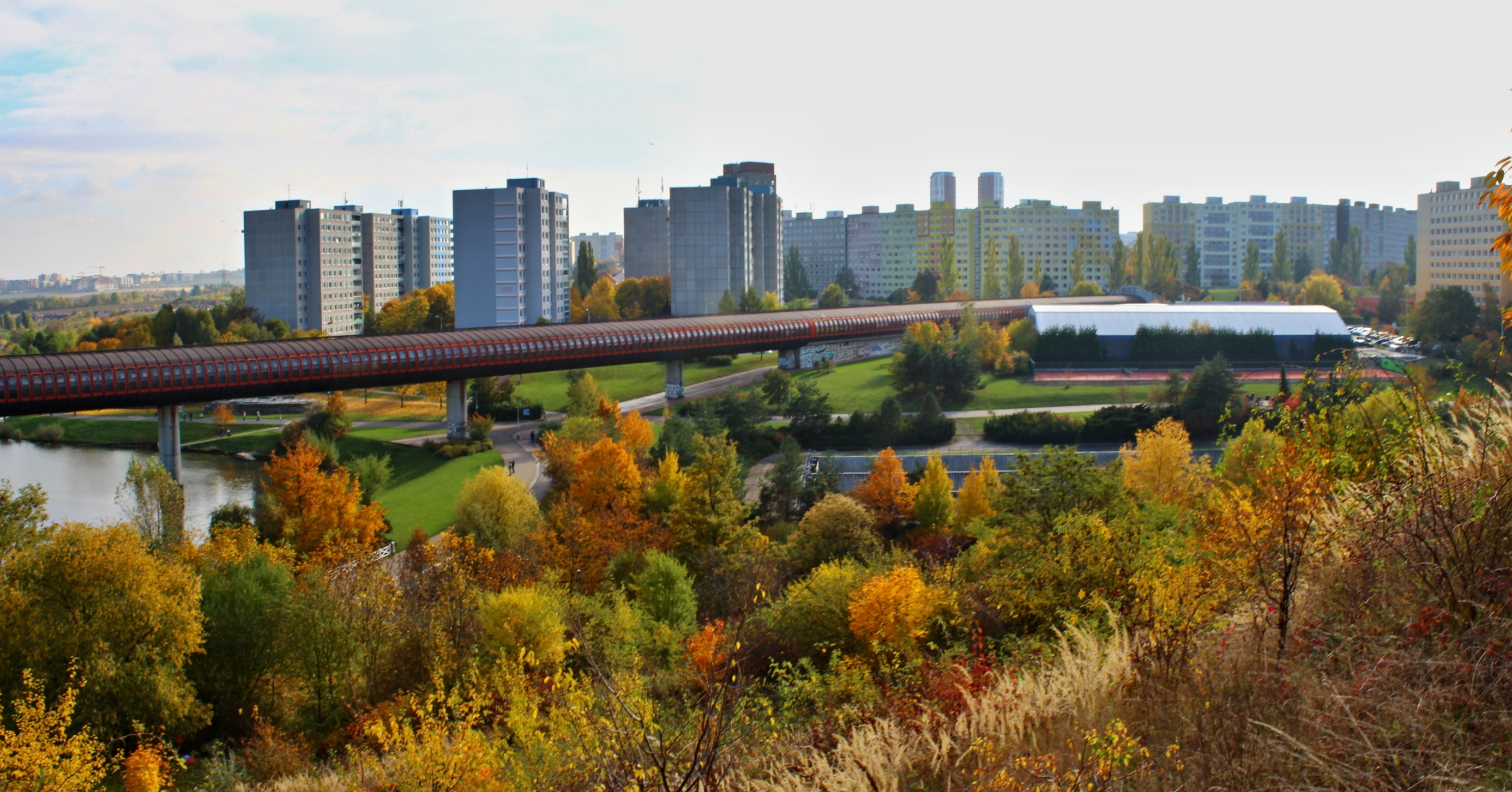 Most metra přes údolí Prokopského potoka